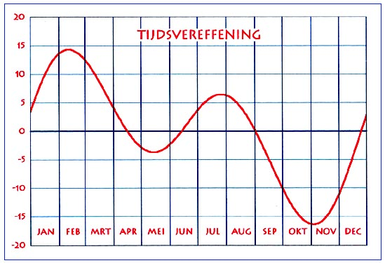 Grafiek tijdsvereffening